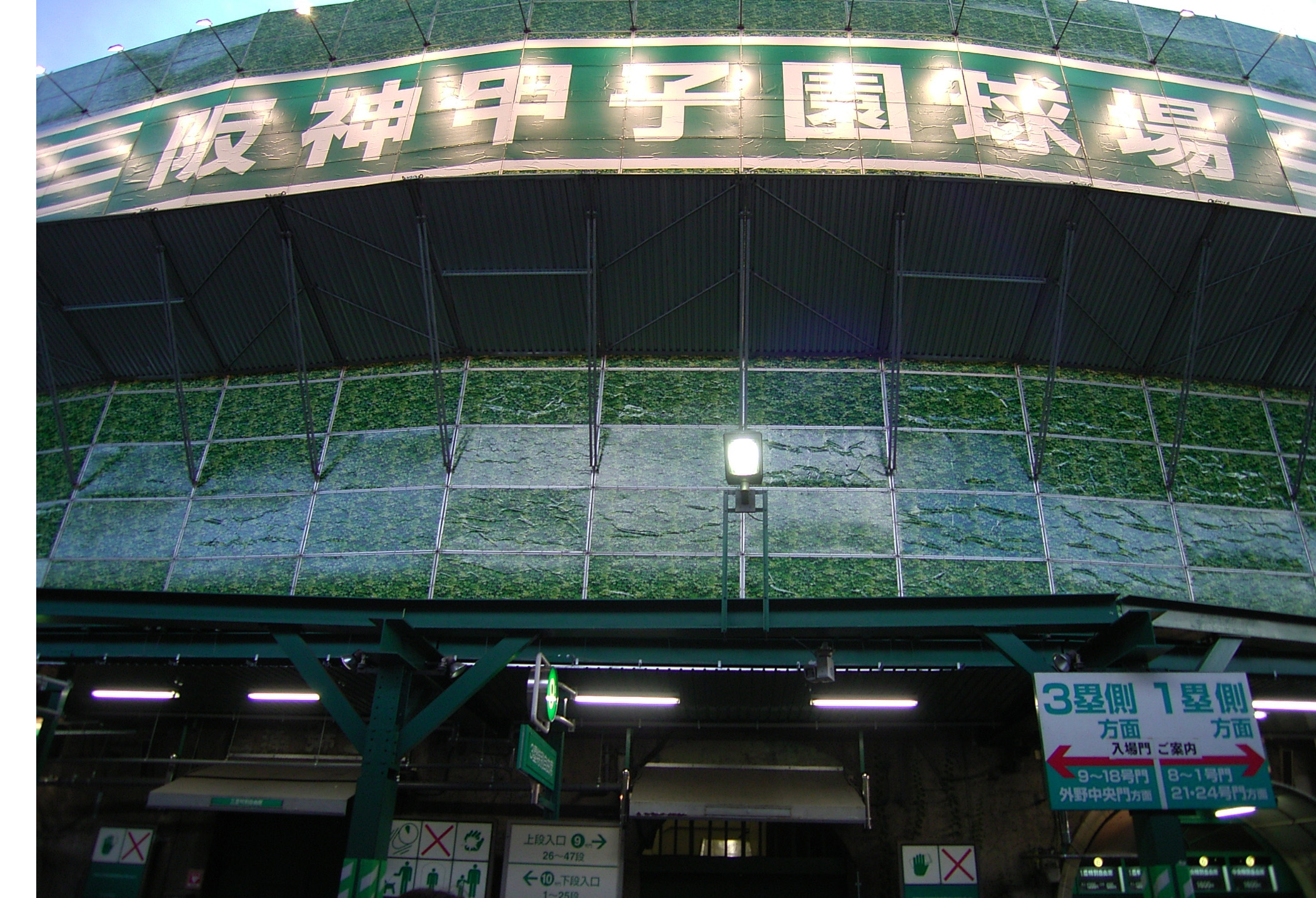 Hanshin Koshien Stadium